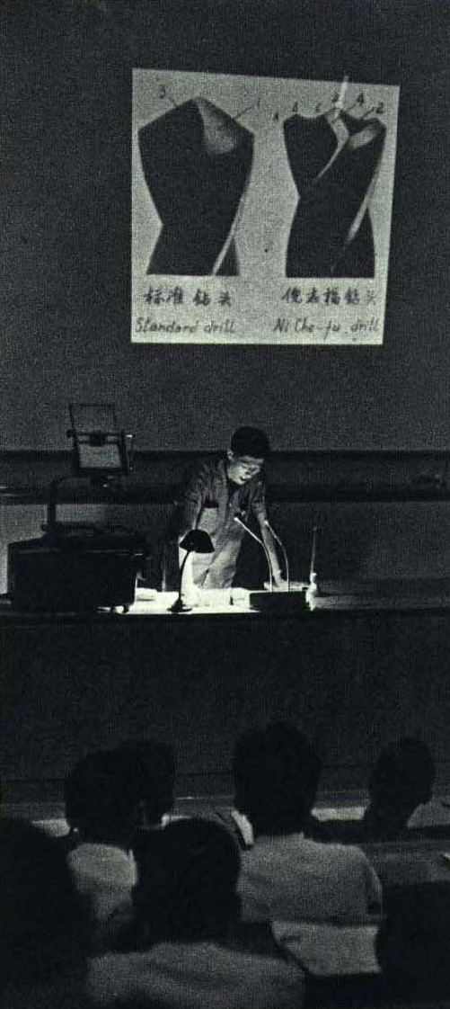 1965-4 1965年 倪志福钻头与倪志福